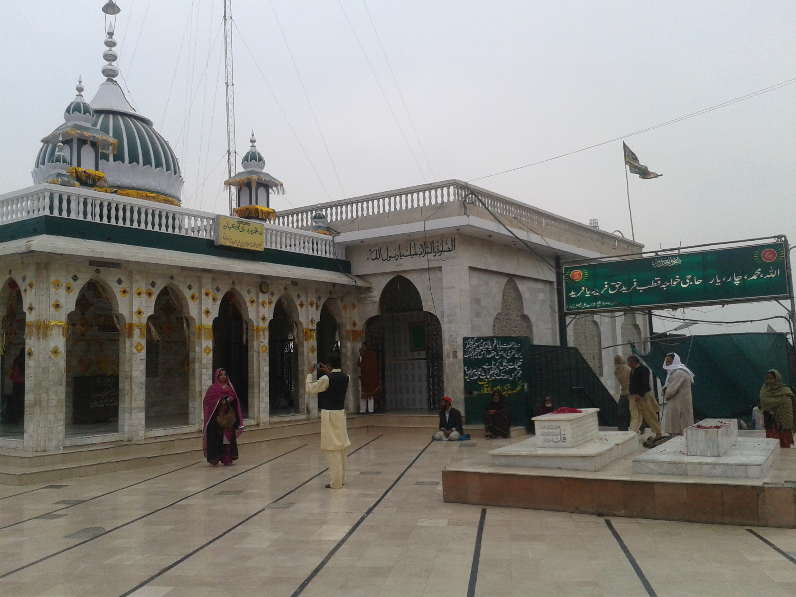 Darbar Hazrat Baba Farid ud Deen Ganj Shakar Rahmatullah Alaih